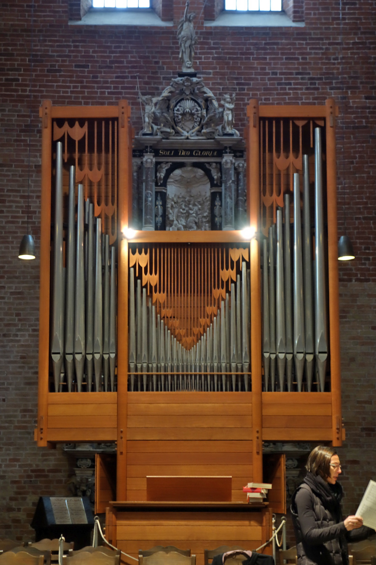 Orgel im Ratzeburger Dom, Schleswig-Holstein